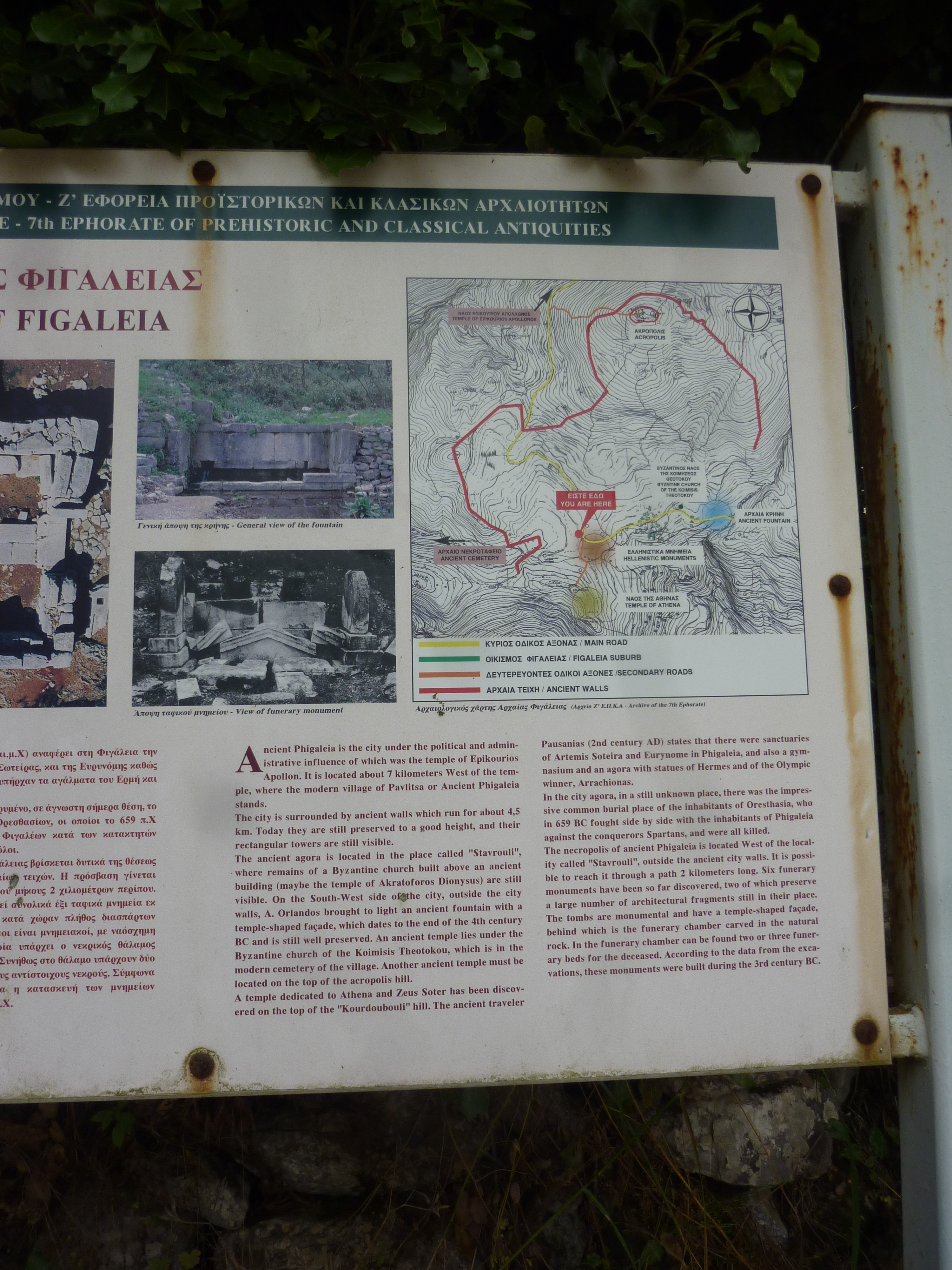 Notice sur le site archéologique de Phigalie, Grèce